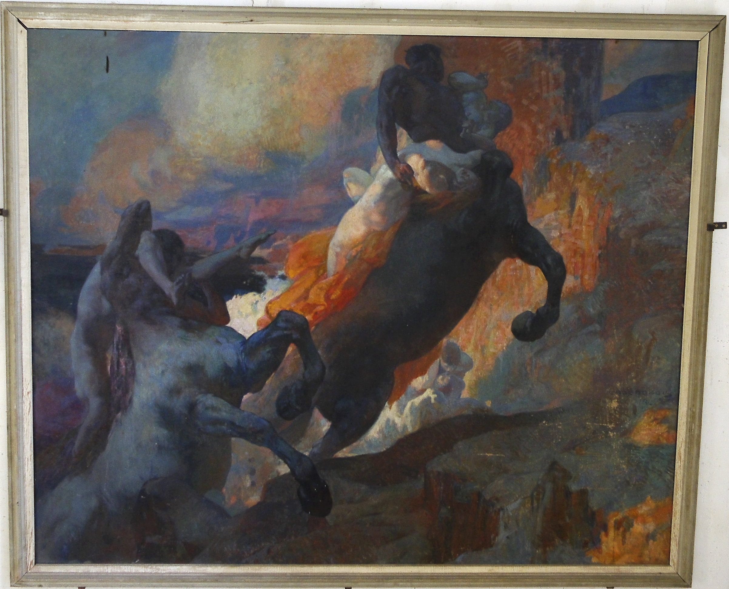 Brantôme - abbaye, tableau représentant 2 centaures enlevant des femmes, photo prise depuis la cage d'escalier, entrée de gauche. (Peintre : Jules-René Bouffanais